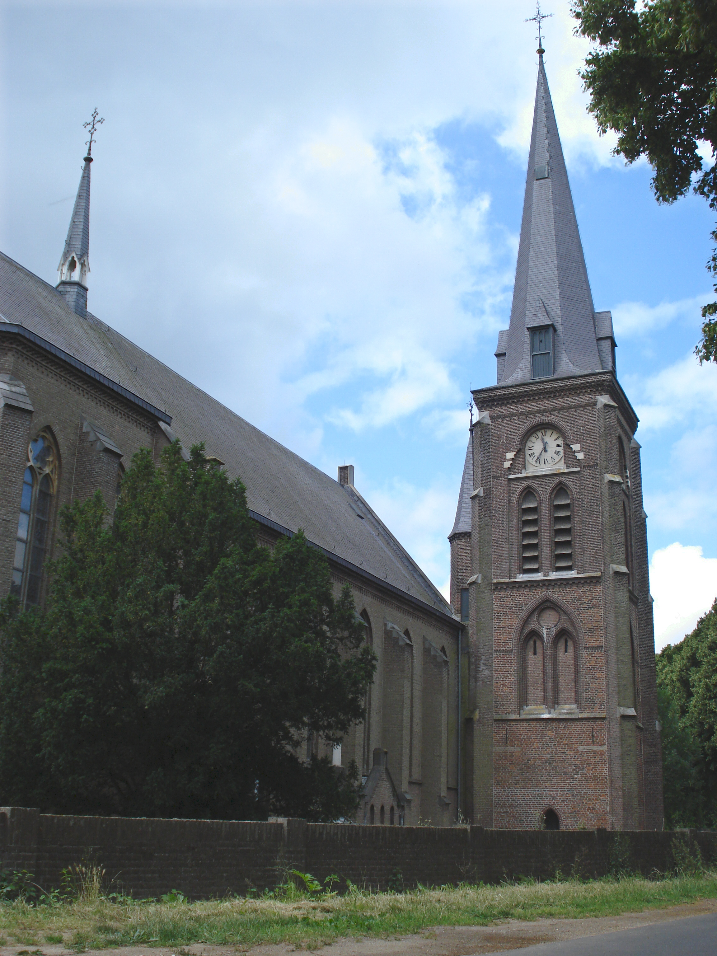 Demen, la tour à coté de l'eglise